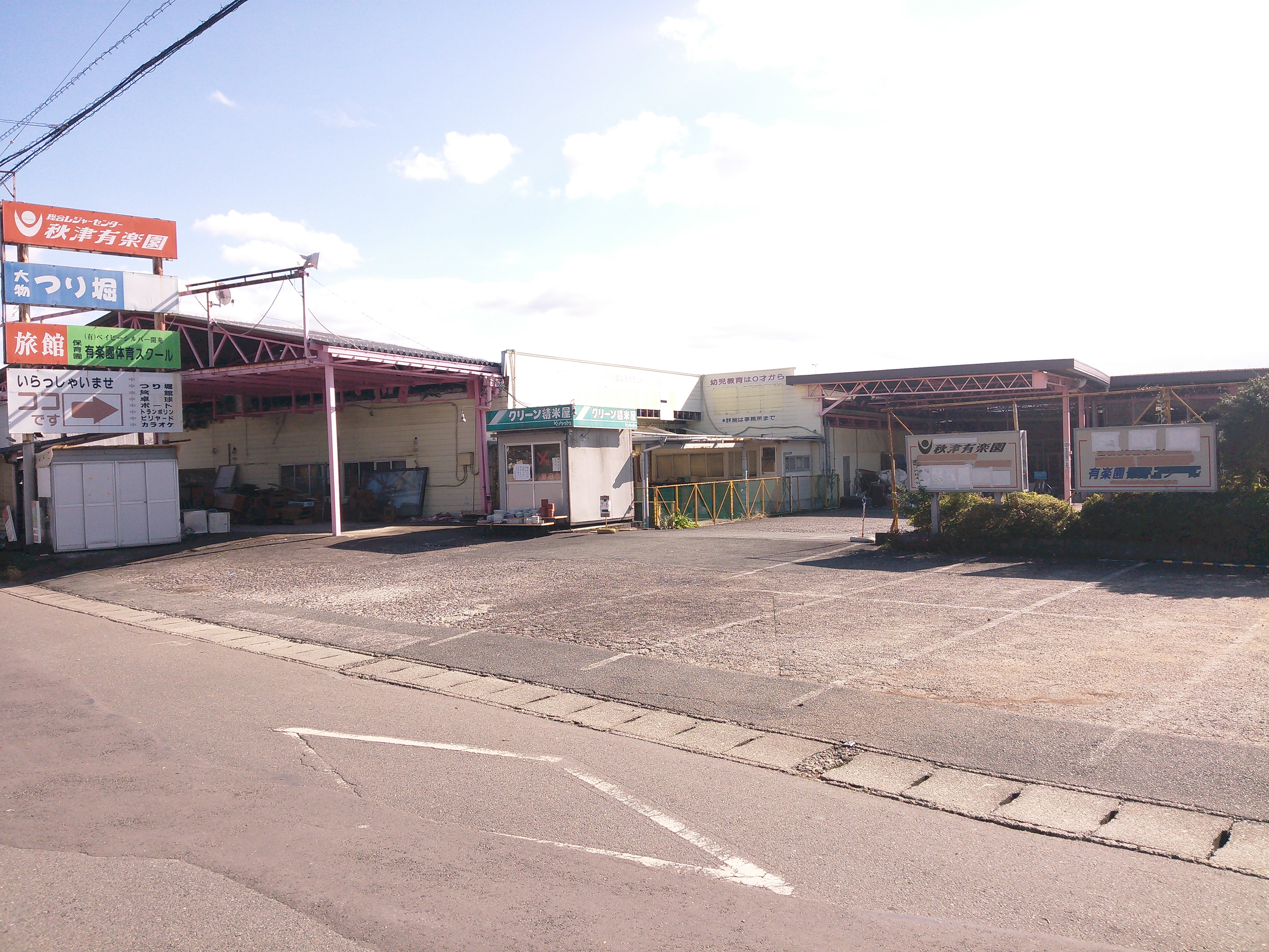 熊本市東区の総合レジャーランド、秋津有楽園。熊本地震で被災し営業を終了したのちの2016年11月に撮影。